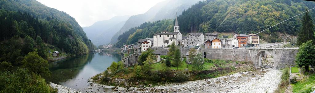 Panorama - Rimasco